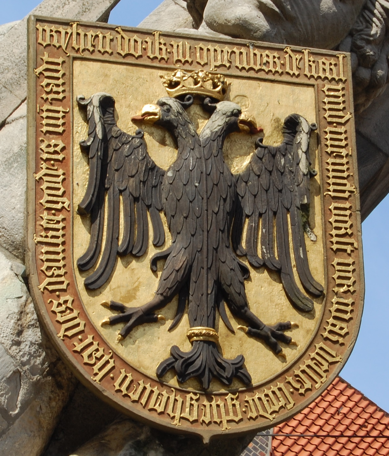 Wappen des Rolands auf dem Bremer Marktplatz